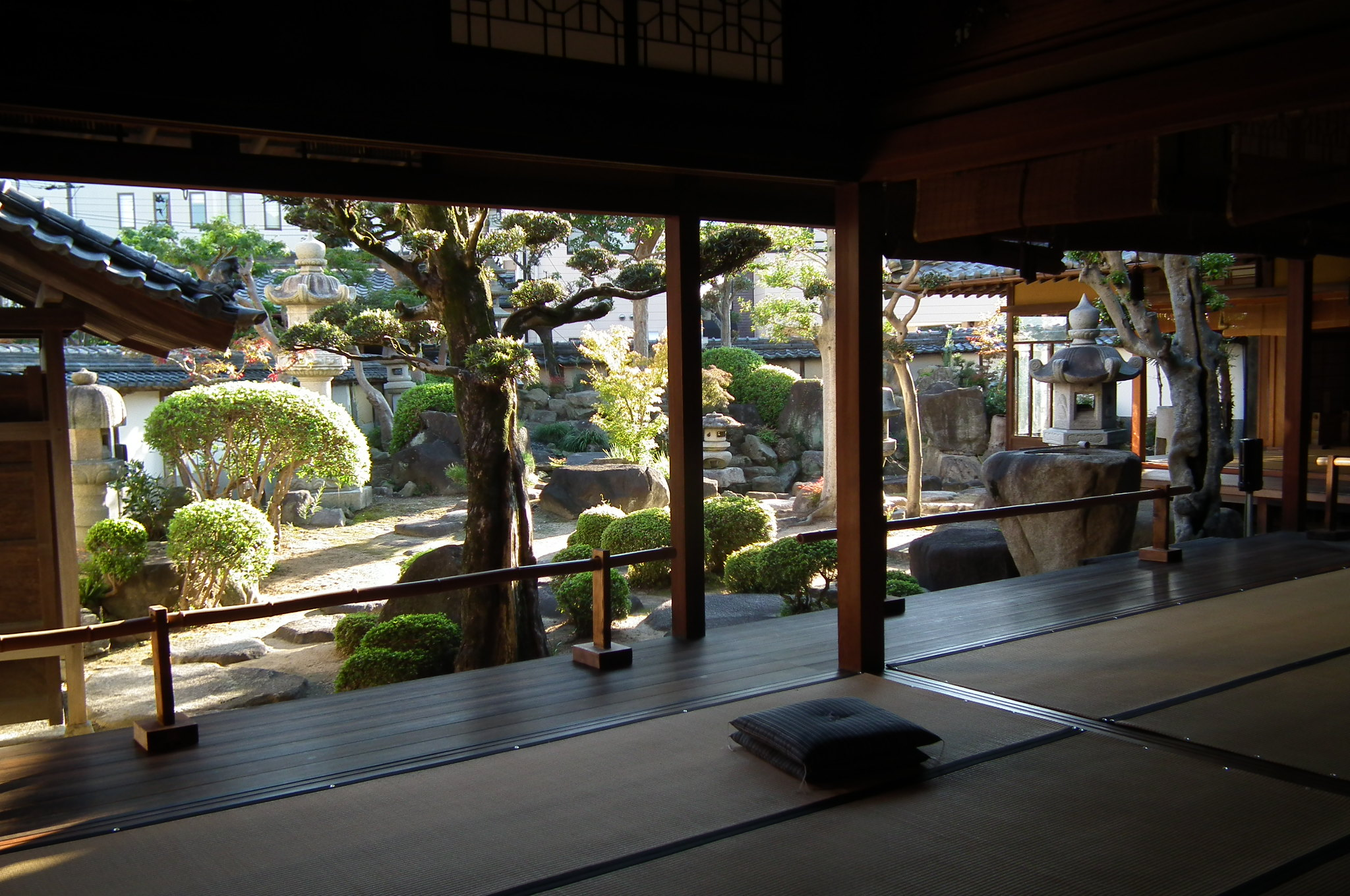 Old Kishi-House Nishiwaki,Hyogo,Japan 旧来住家住宅（来住梅吉旧邸）